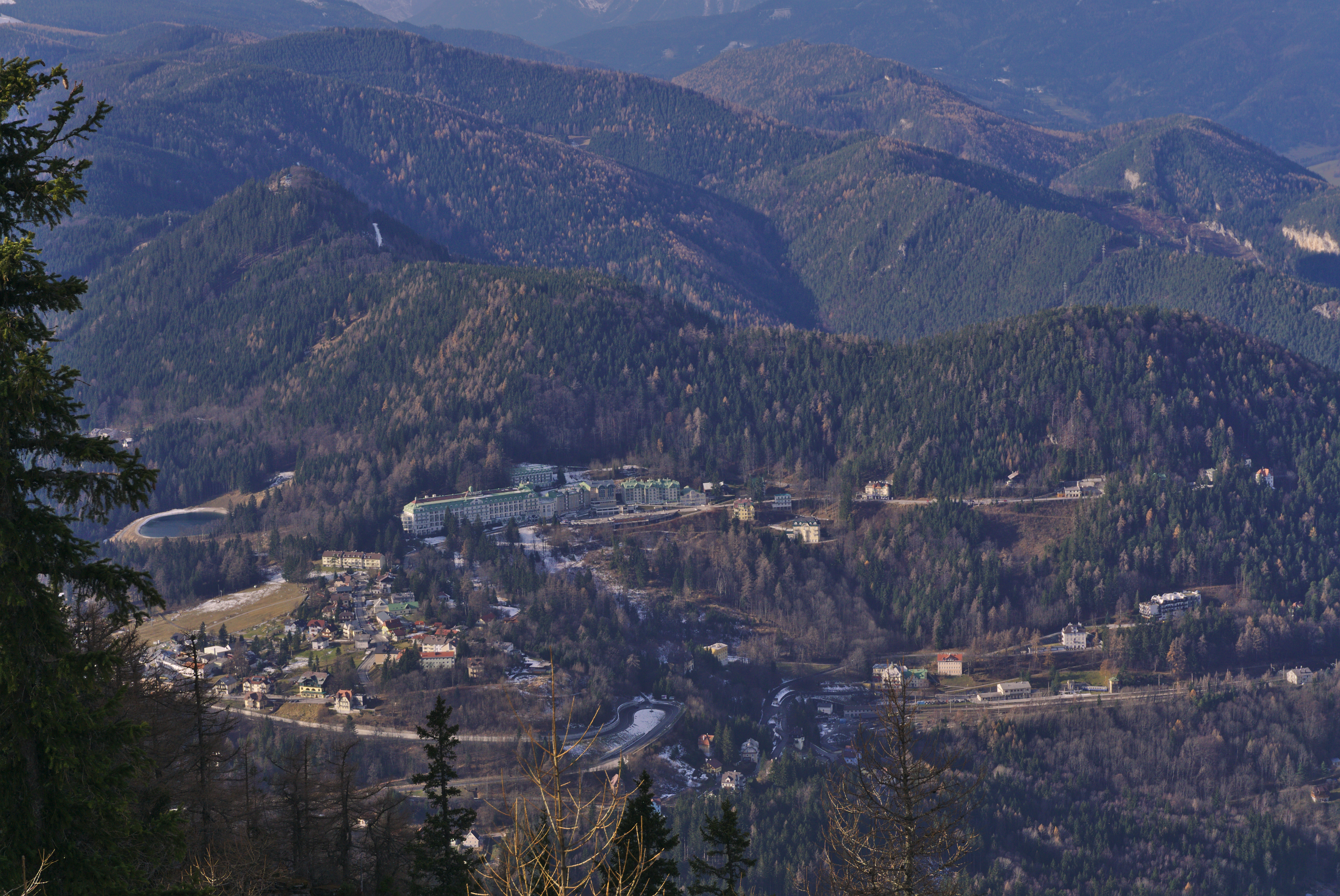 Semmering vom Sonnwendstein gesehen